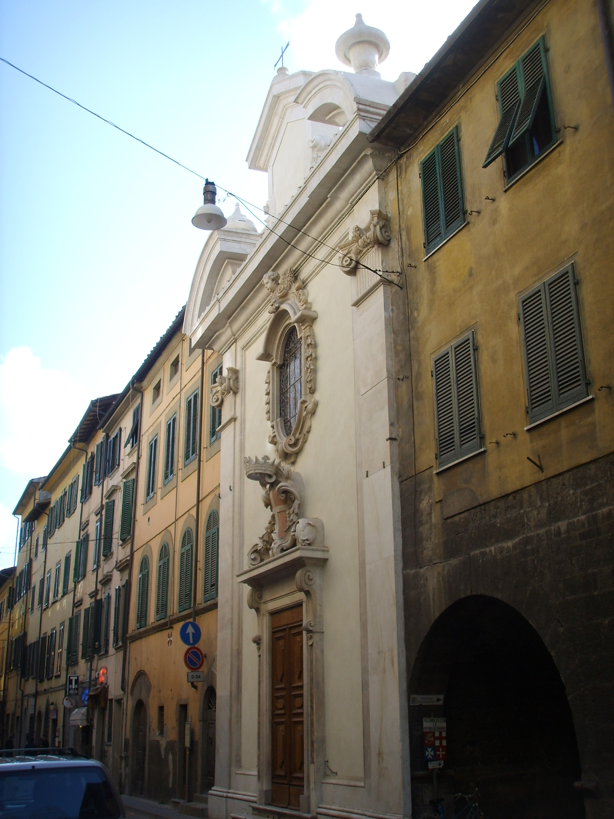 Santa Maria Maddalena, pisa